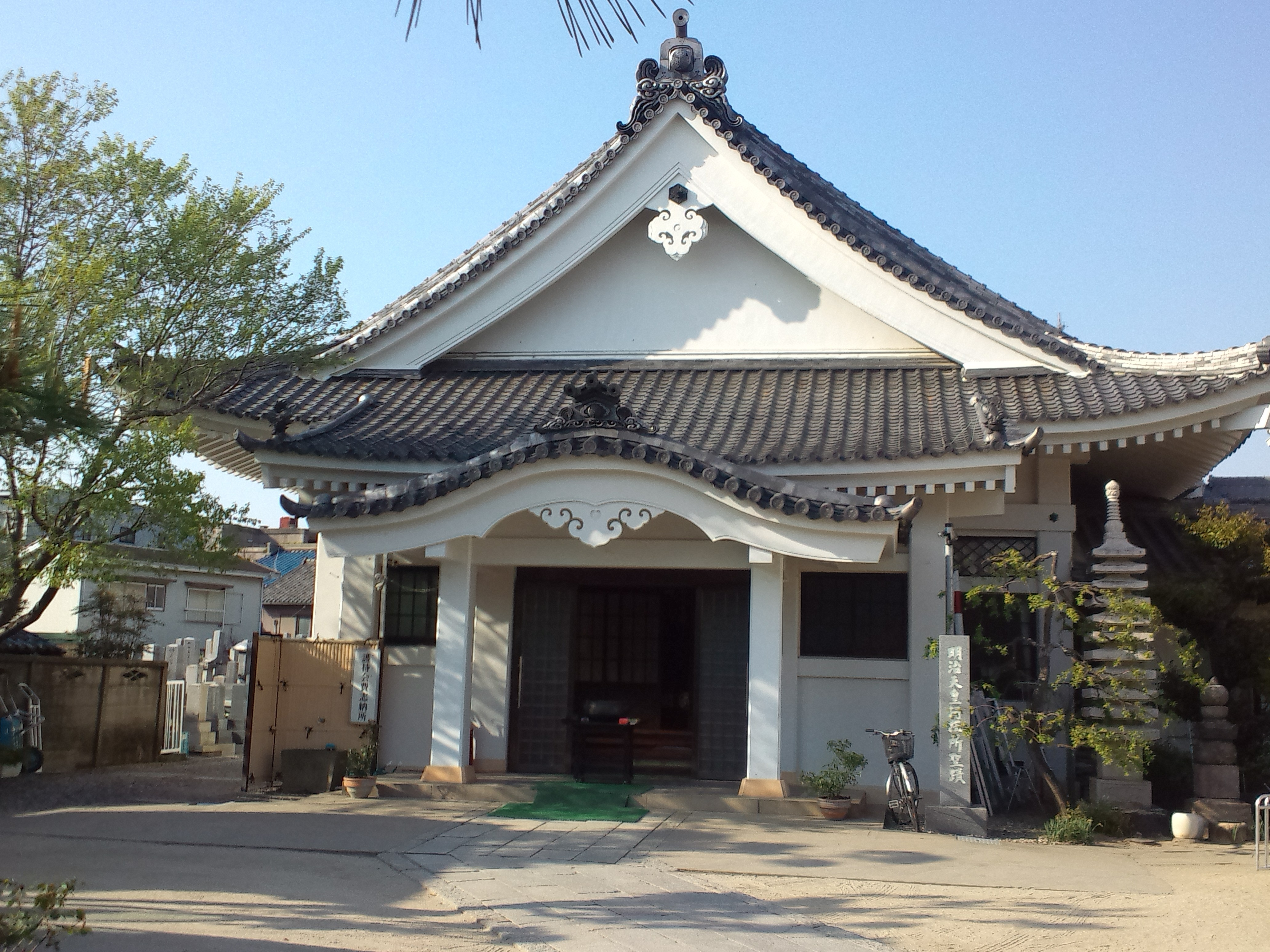 悟真寺 拝殿